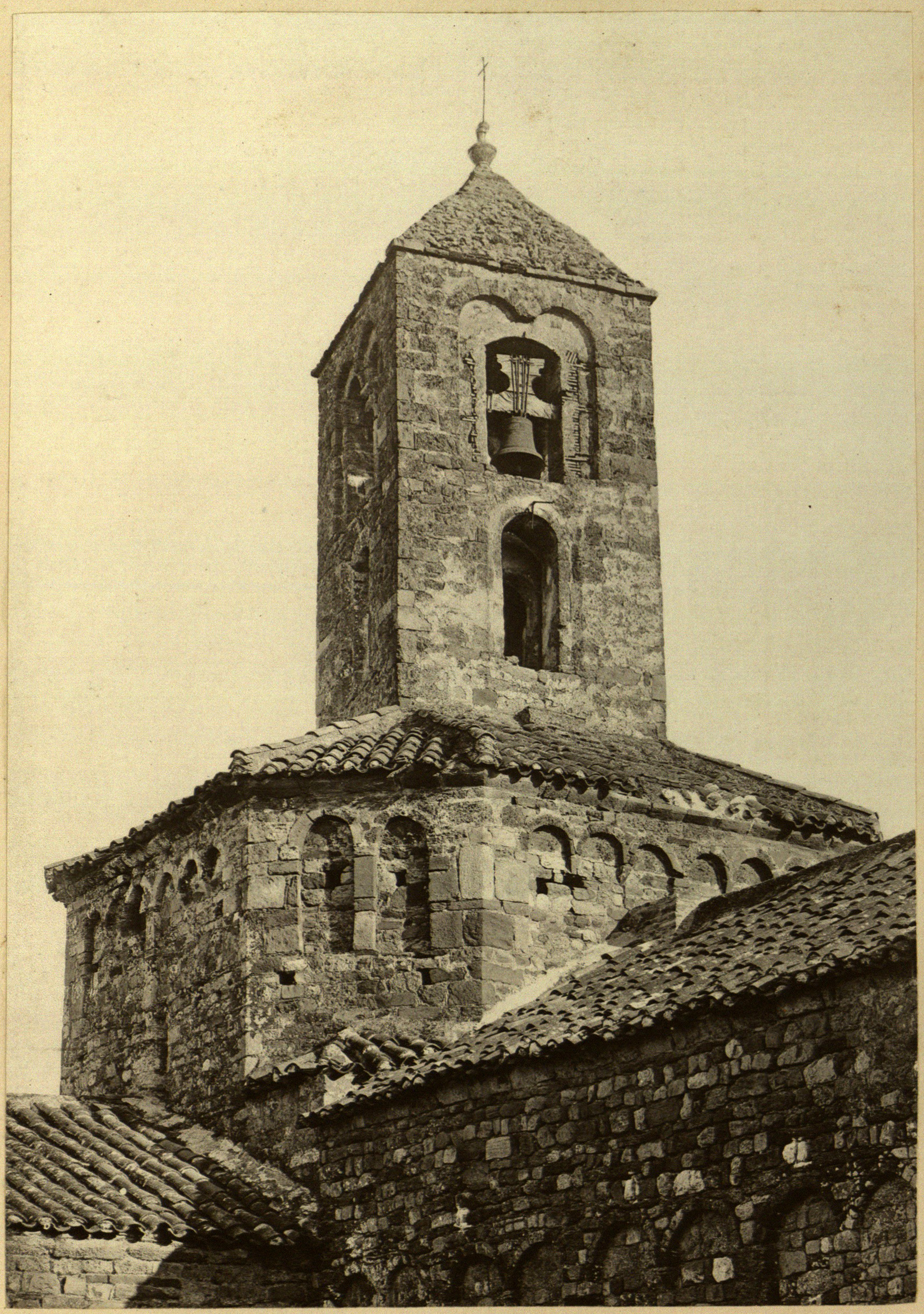 'Santa Maria de Terrassa', fotografia d'Heribert Mariezcurrena (~1878). Estampa núm. 23, acompanyada de text explicatiu, a l'Album Pintoresch-Monumental de Catalunya: aplech de vistas dels més notables monuments i paisatjes d'aquesta terra acompanyadas de descripcions y noticias históricas y de guias pera que sían fácilment visitats, publicat per l'Associació Catalanista d'Excursions Científiques el 1878. De disposició lliure al dipòsit digital de documents de la UAB.